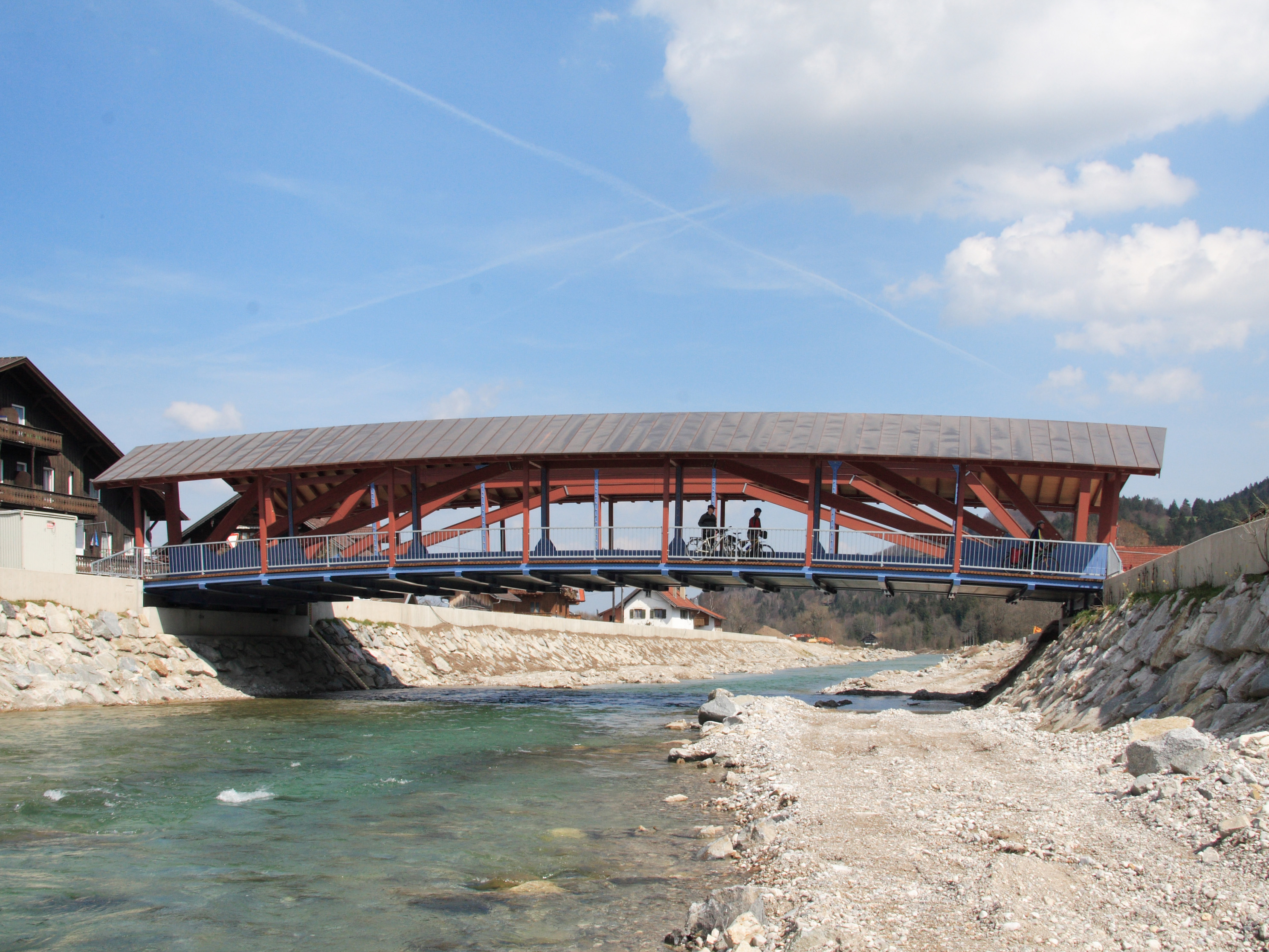 Die neue Brücke in Eschenlohe, Landkreis Garmisch-Partenkirchen